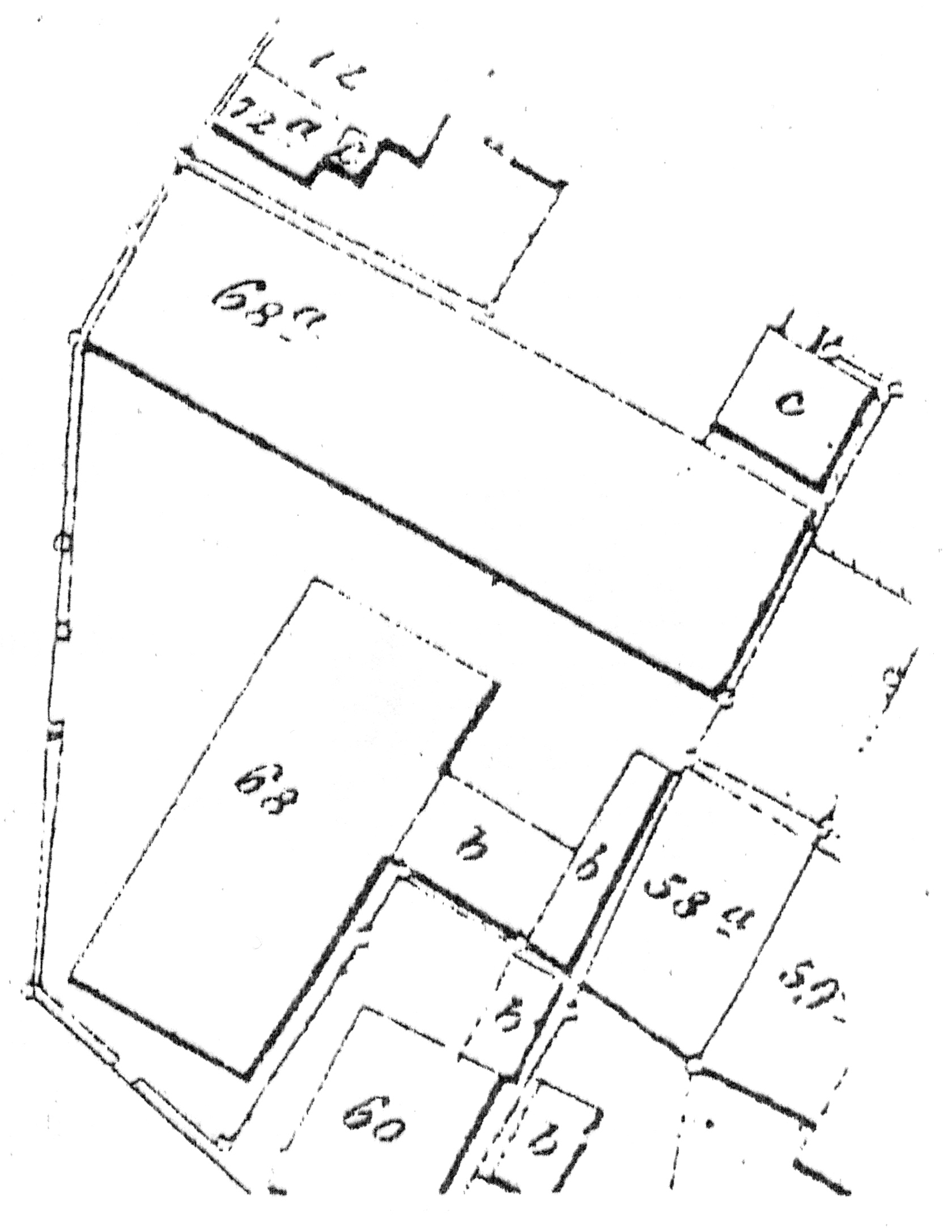 Historisches Gasthaus Lamm in Langenbrettach, Lageplan 1834